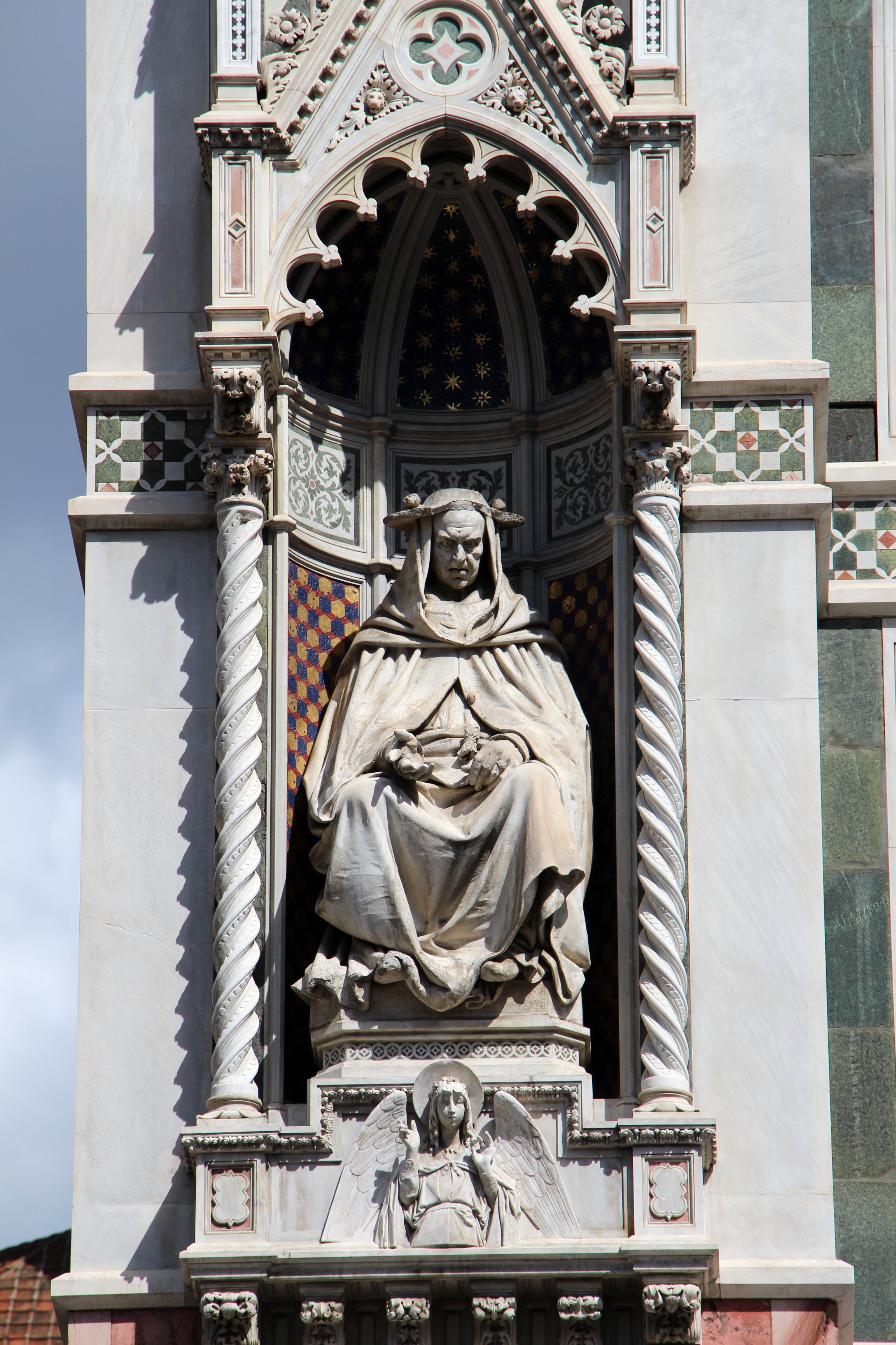 Firenze, vedi nome file